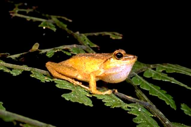 Mantidactylus redimitus = Gephyromantis redimitus